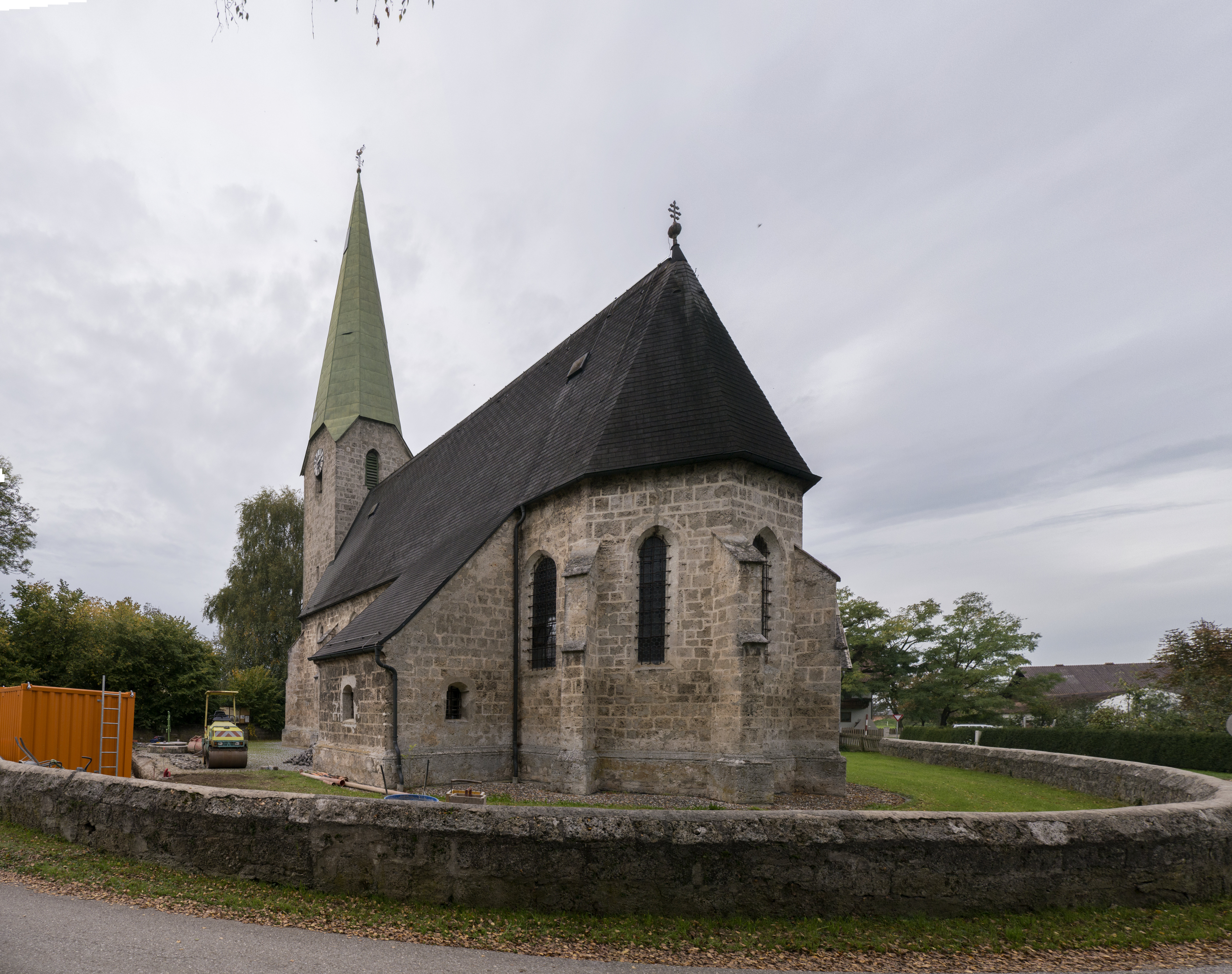 Kath. Filialkirche hl. Georg und Kirchhof mit Ummauerung